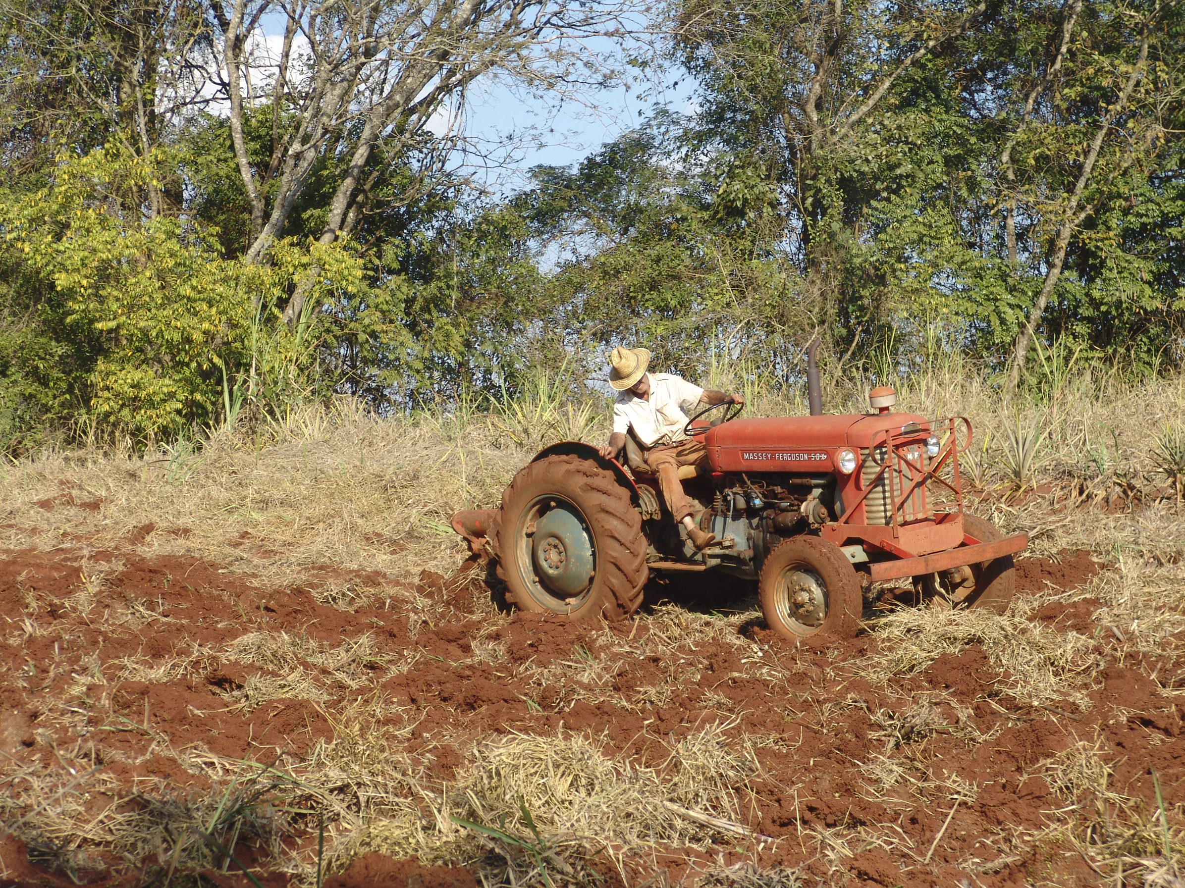 Arando a terra para cultivo da cana-de-açucar, Avaré, São Paulo, Brasil